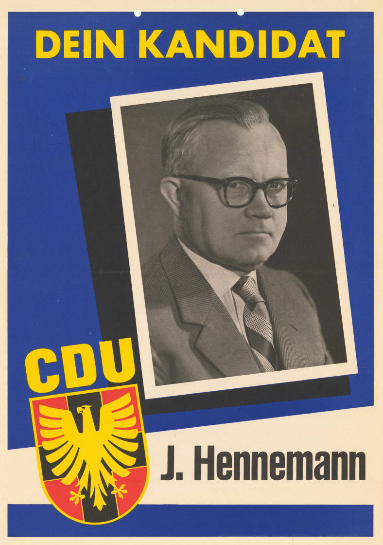 Dein Kandidat CDU J. Hennemann Abbildung: Porträtfoto - CDU-Logo Plakatart: Kandidaten-/Personenplakat mit Porträt Objekt-Signatur: 10-009 : 449/4 Bestand: Landtagswahlplakate Nordrhein-Westfalen ( 10-009) GliederungBestand10-18: Landtagswahlplakate Nordrhein-Westfalen (10-009) » Landtagswahl am 6.7.1958 » CDU » mit Porträt-Foto Lizenz: KAS/ACDP 10-009 : 449/4 CC-BY-SA 3.0 DE